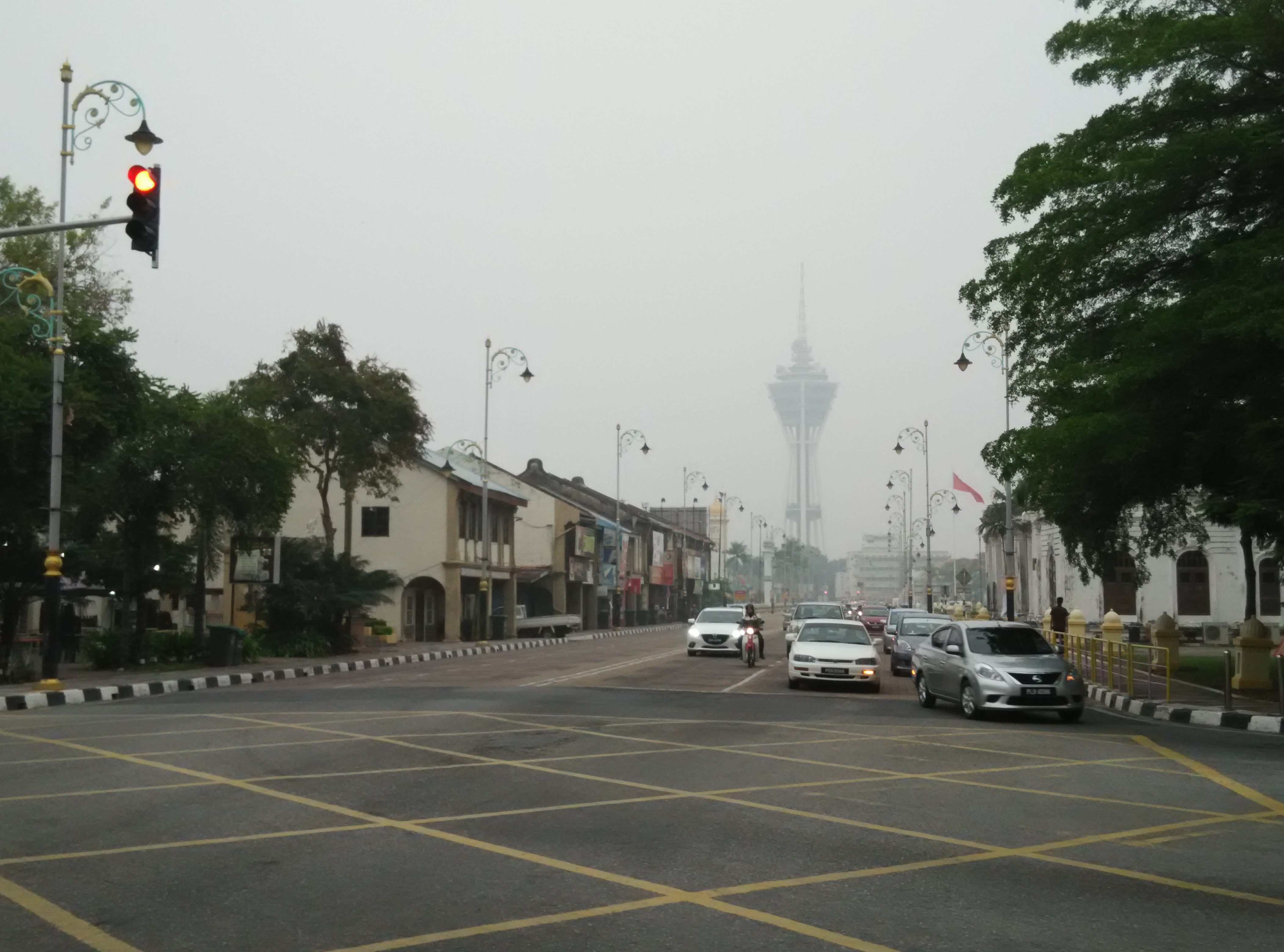 Hazy Alor Setar Tower